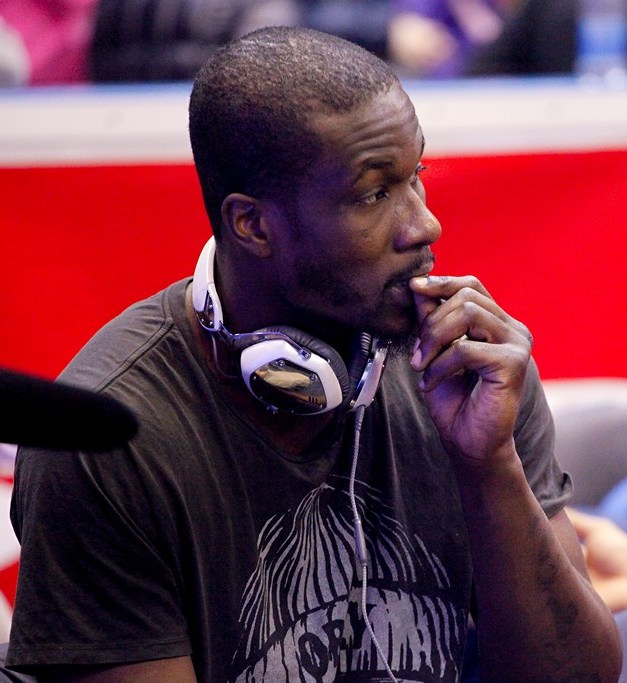 Матч всіх зірок баскетбольної Суперліги 2012, Київ.